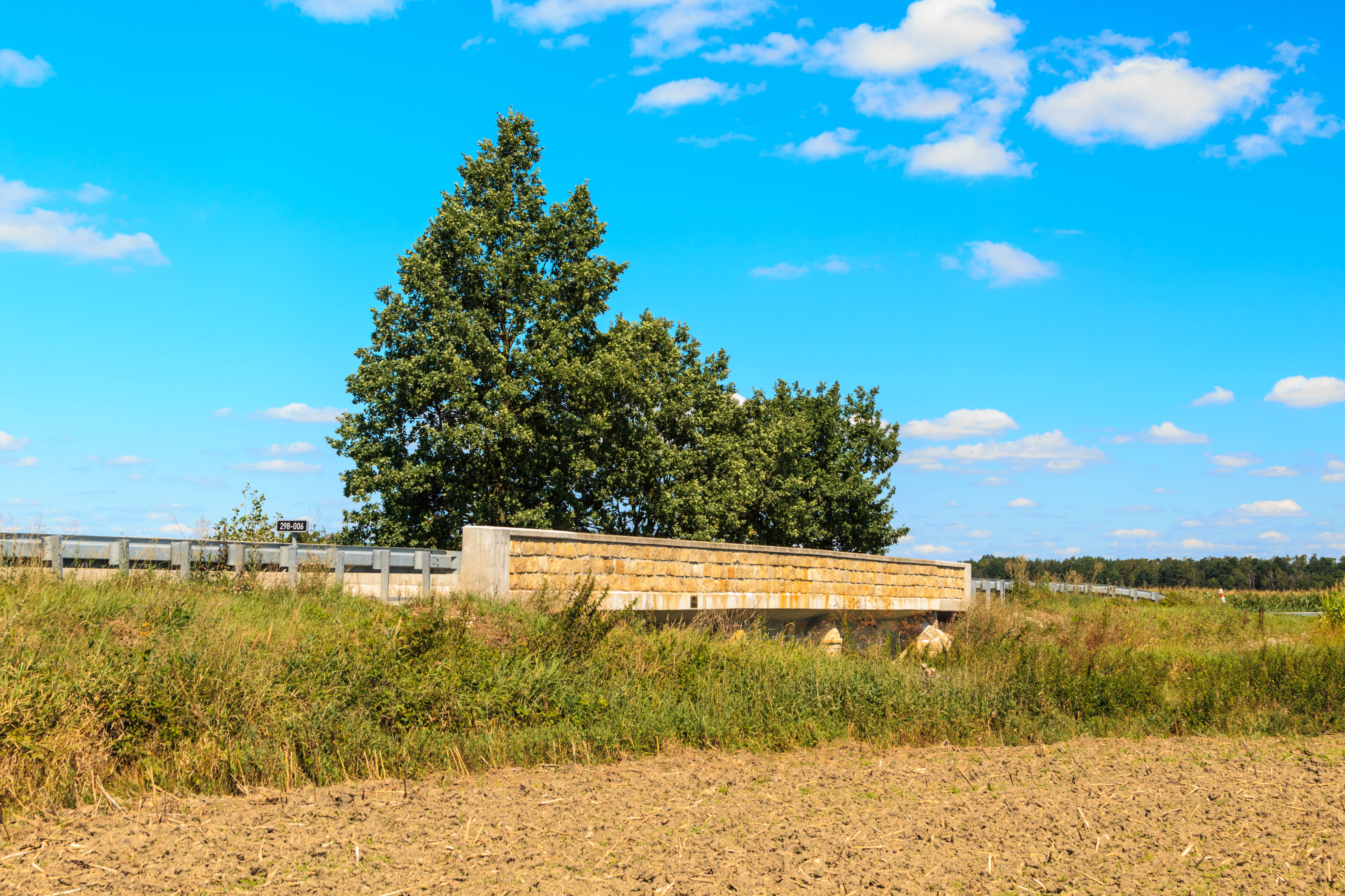 Silniční most, přes Brodecký potok, silnice Býšť-Sezemice, Bohumileč (Rokytno).